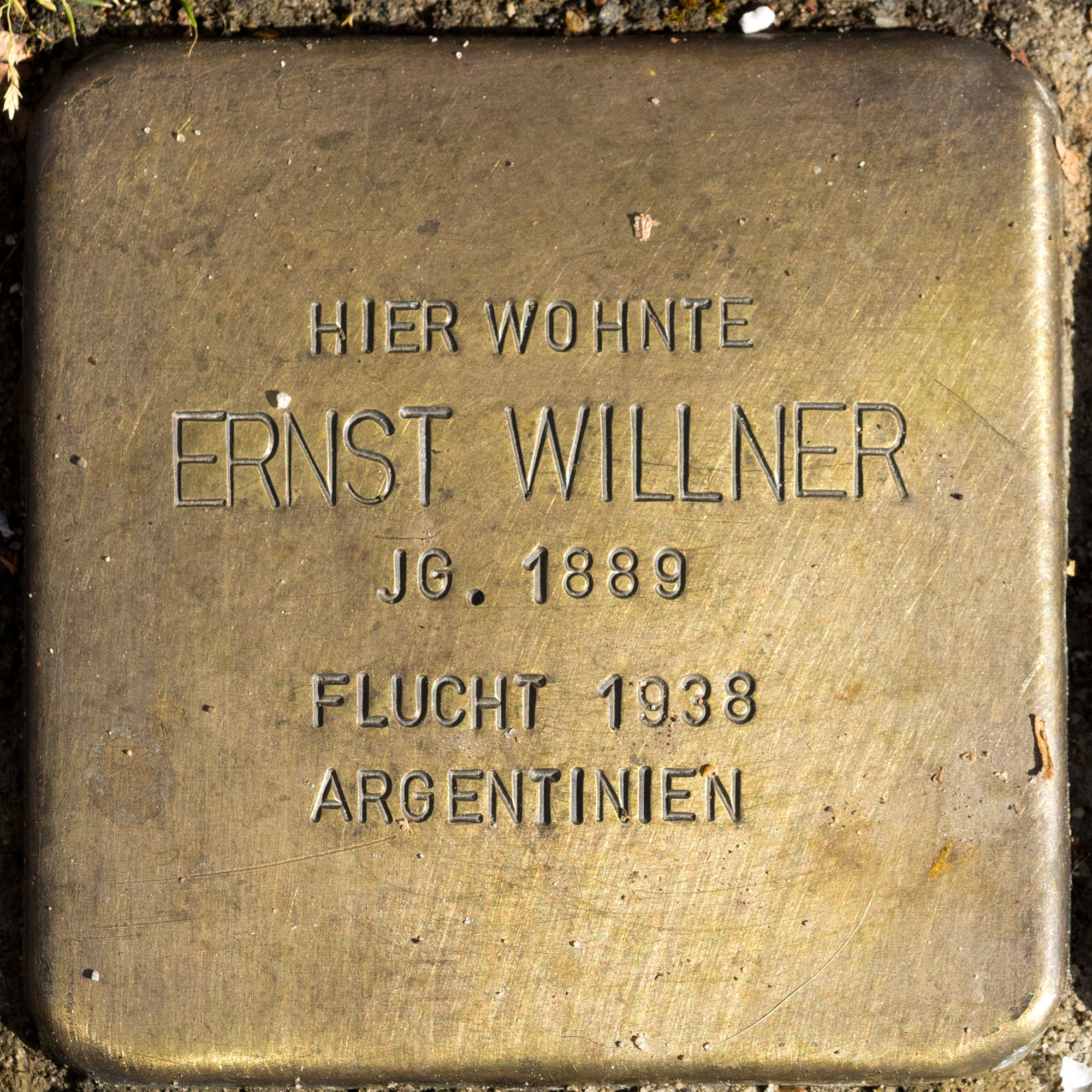 2016 Stolpersteine ToeVo Willner Ernst